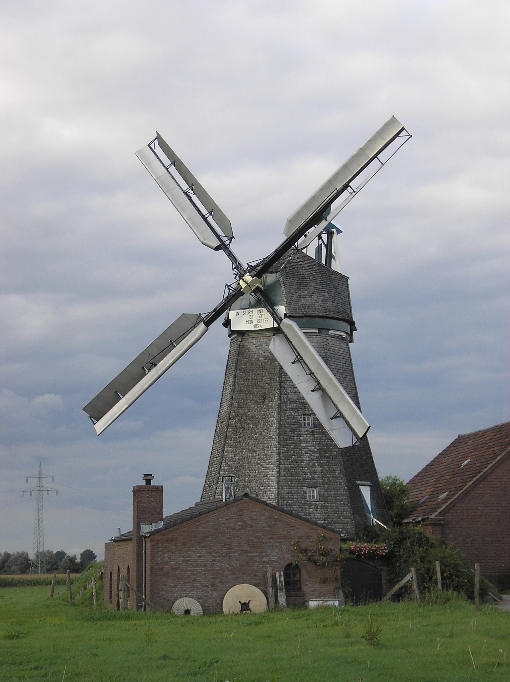 Die Windmühle von Donsbrüggen, Stadt Kleve. Bemerkenswert sind die vertikalen Aluminiumklappen der Flügel.